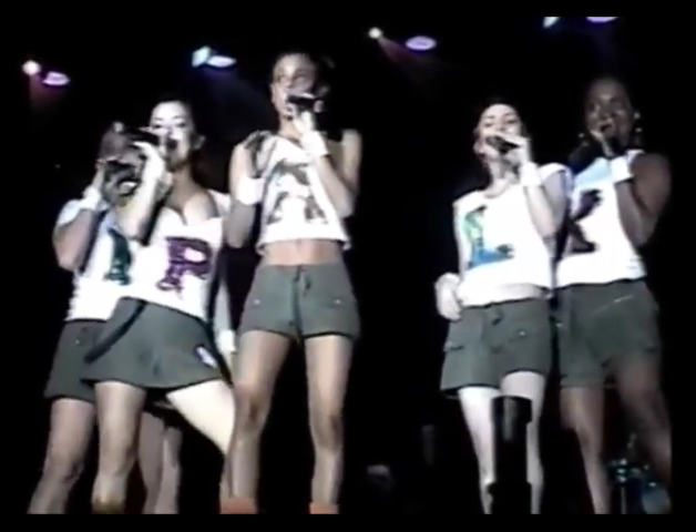 Rouge no inicio da carreira.